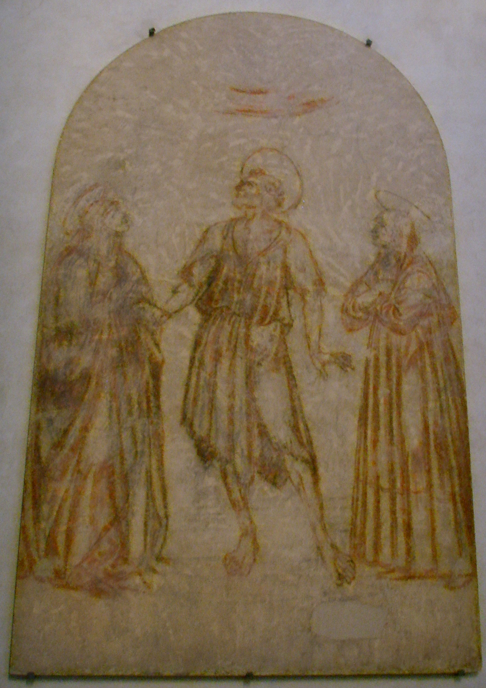 Andrea del castagno, sinopia di san girolamo, da ss annunziata